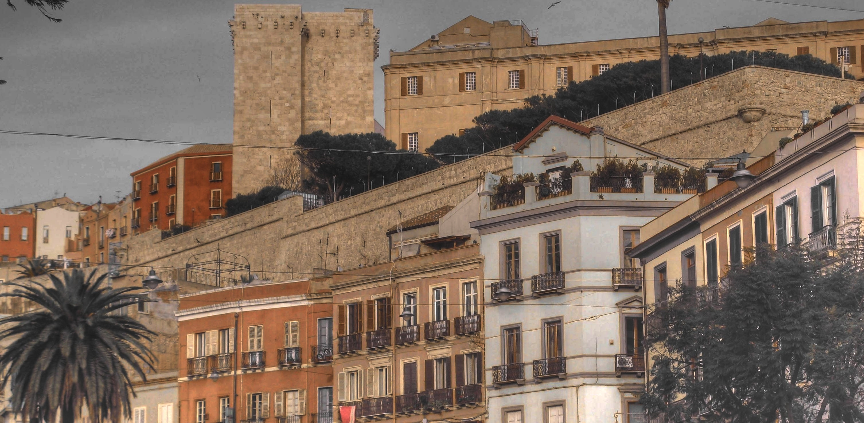 Cagliari vista da Piazza Yenne